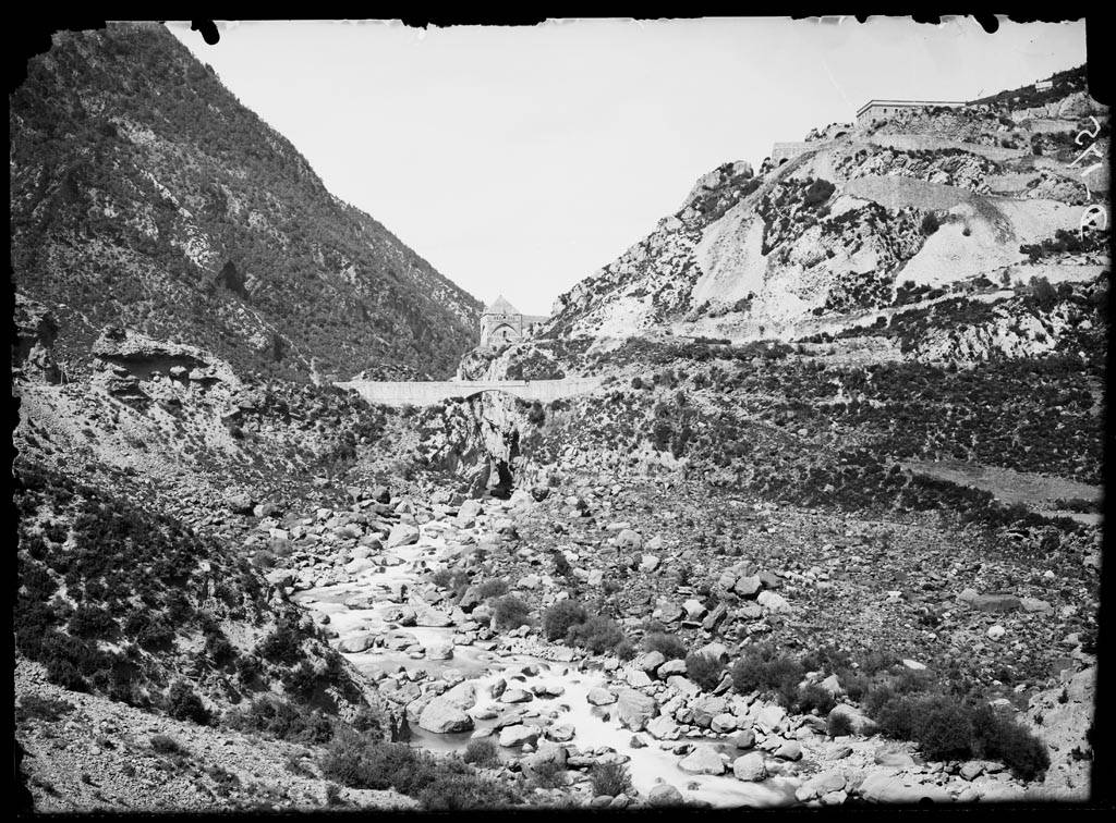 Imatge